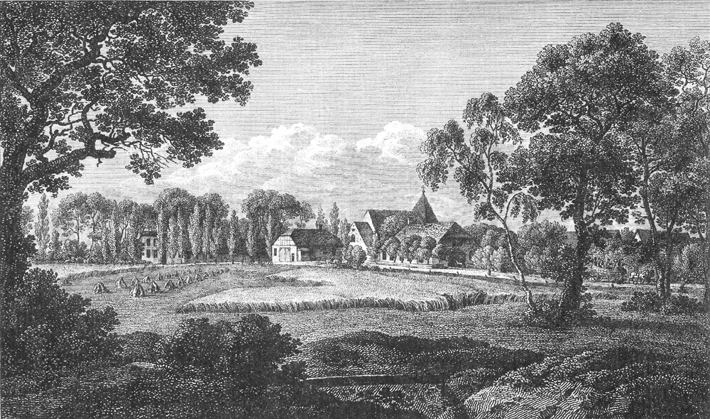 Bildvorlage von Anton Radl (1774–1852) aus dem Jahr 1818/1819: Blick von Lehe auf das Dorf Horn mit der ehemaligen Kirche und einigen bekannten Häusern